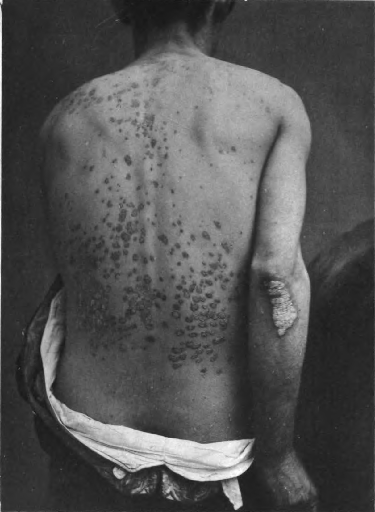 Psoriasis guttata